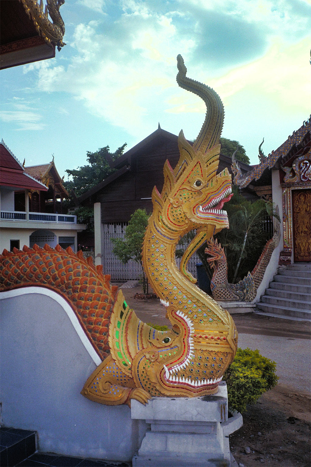 Naga guarding a staircase, Wat Mahawan, Chiang Mai, Thailand.